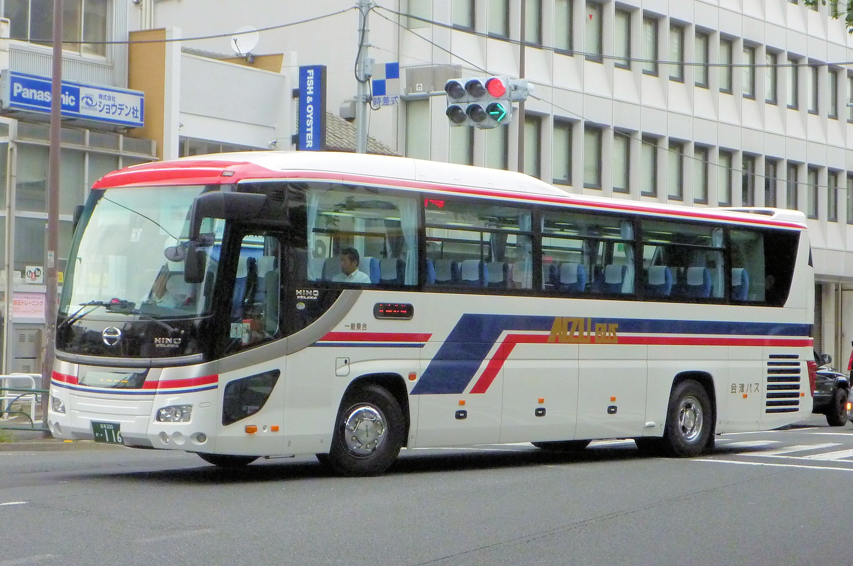 夢街道会津号/会津乗合自動車（会津バス）/会津200か116/日野セレガ